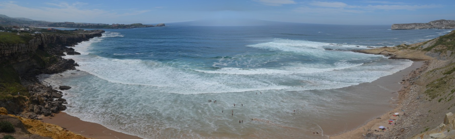 Панорама пляжа Playa los Caballos